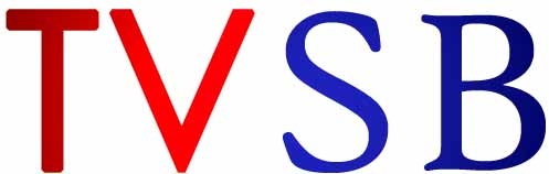 Logo de la WebTV Télévision Saint-Benoist. Par le Syndicat d'initiative de Saint-Benoist-sur-Mer